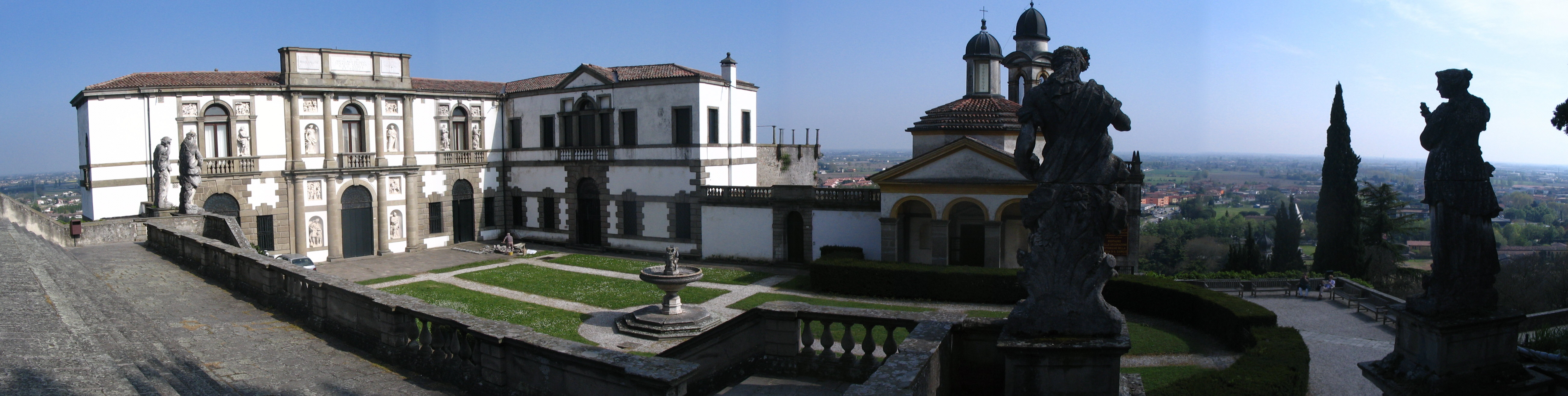 Monselice - Villa Duodo - par Vincenzo Scamozzi - construction 1591-1597, et par Andrea Tirali 1740.